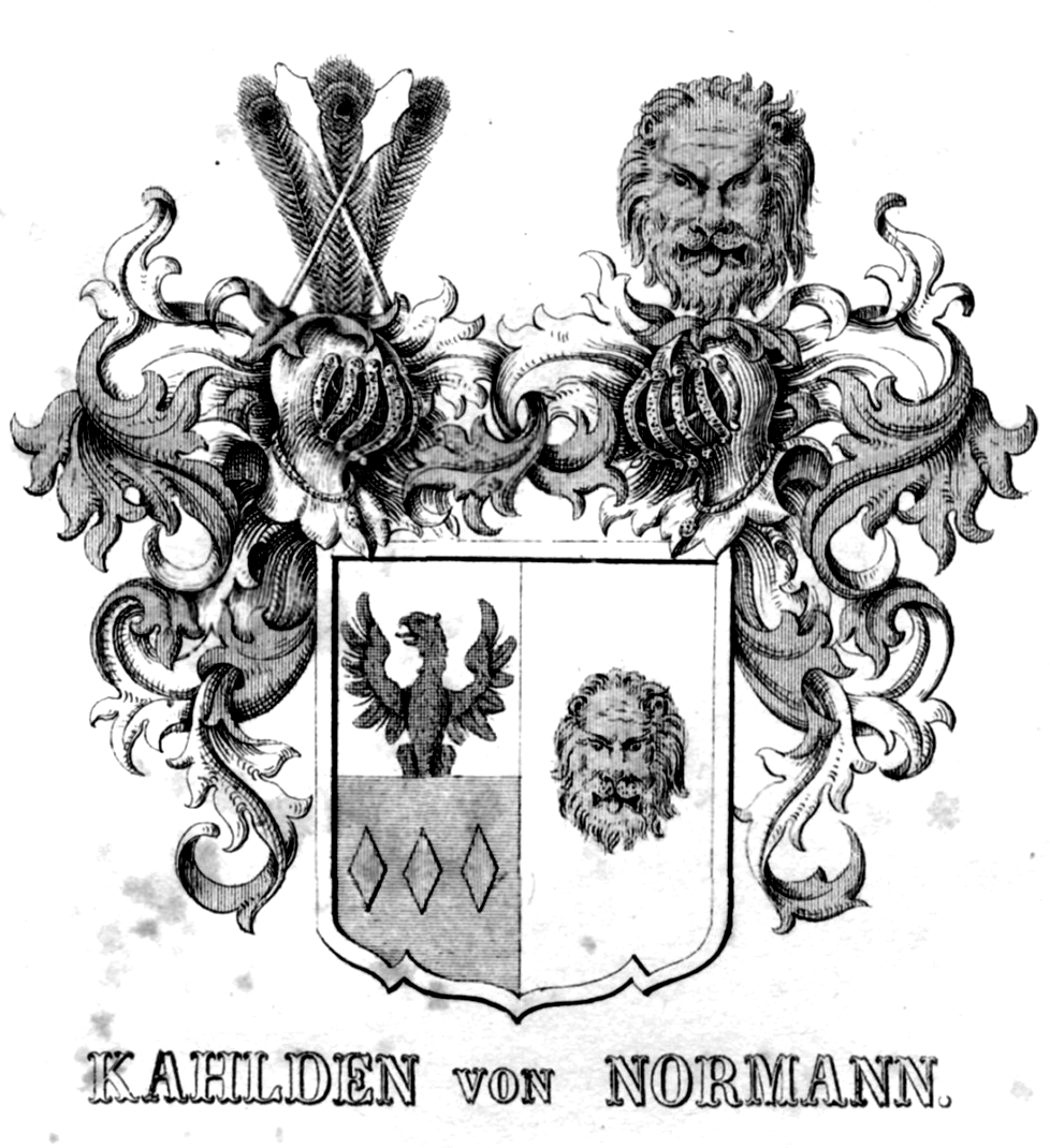 Wappen derer von Kahlden von Normann.